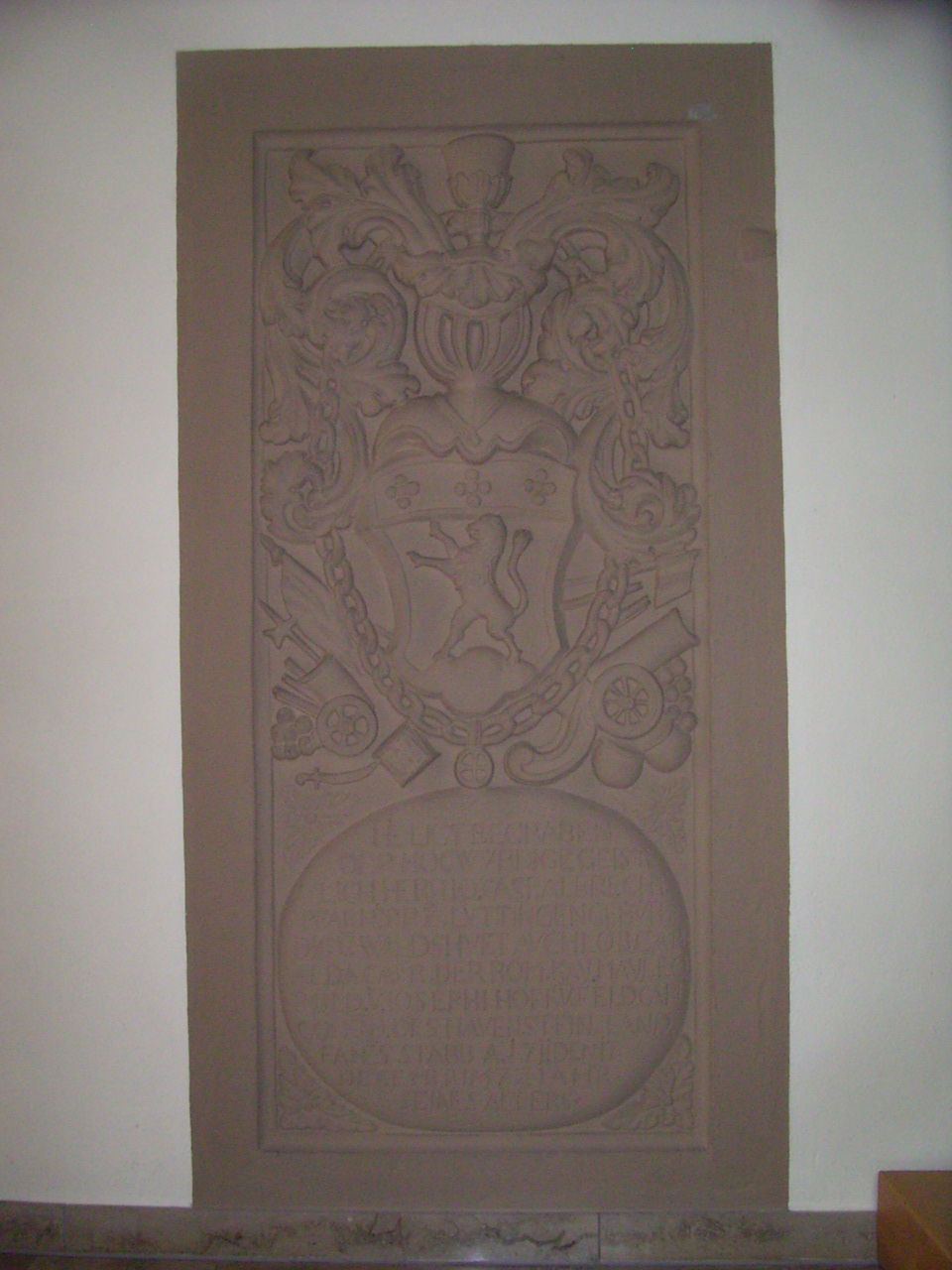 Epitaph des Seelsorgermilitärs Johann Caspar Albrecht 1639-1711 im Chor der Pfarrkirche von Luttingen bei Laufenburg